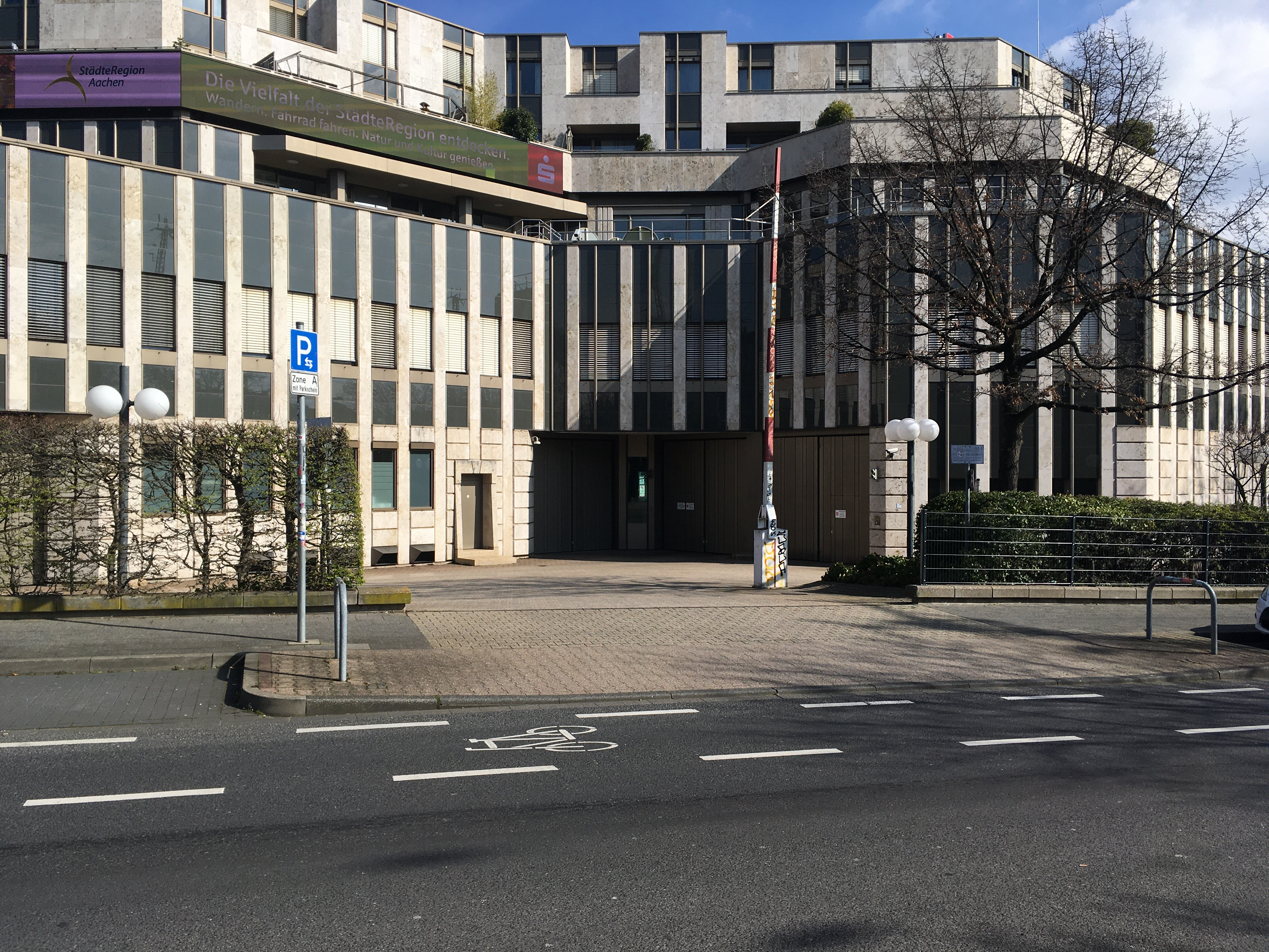 Blick auf die Fahrzeugschleuse der ehemaligen LZB Aachen. Seit 2012 Niederlassung der Sparkasse Aachen.